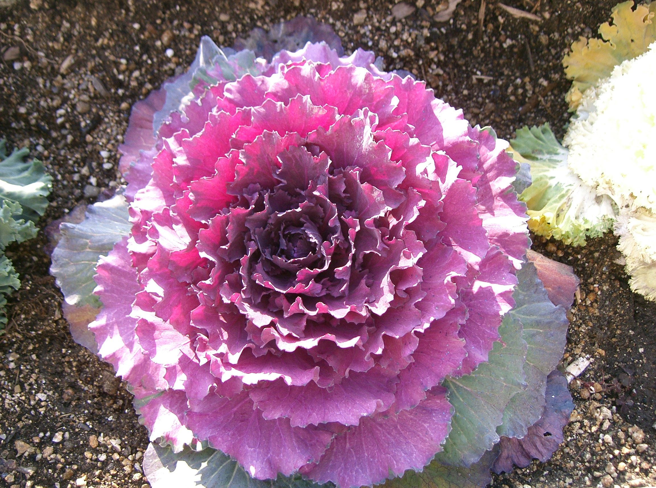 cabbage